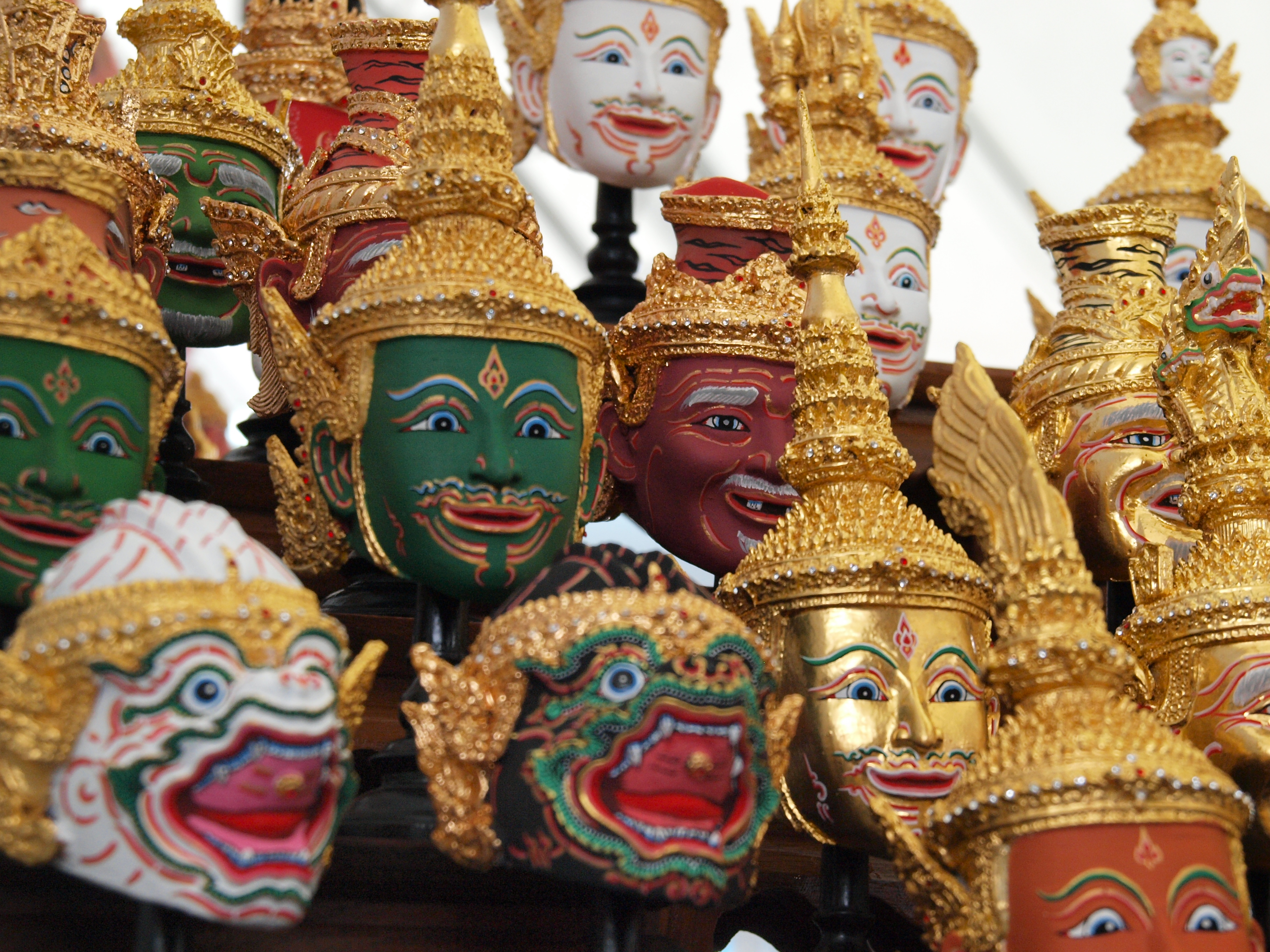 ภาพถ่ายหัวโขนขนาดจำลองหน้ายักษ์ หน้าลิง หน้ามนุษย์ ถ่ายจากงาน "กรุงเทพฯ ถนนวัฒนธรรม" ของดีเขตบางพลัด ระหว่างวันที่ 1-5 กันยายน 2553